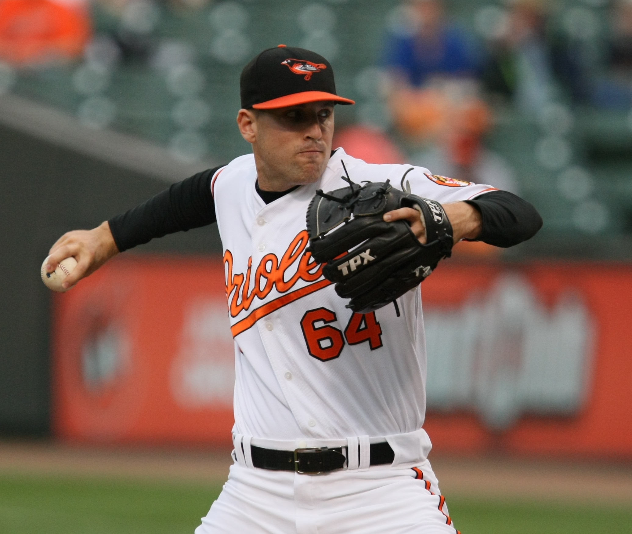 Brad Bergesen